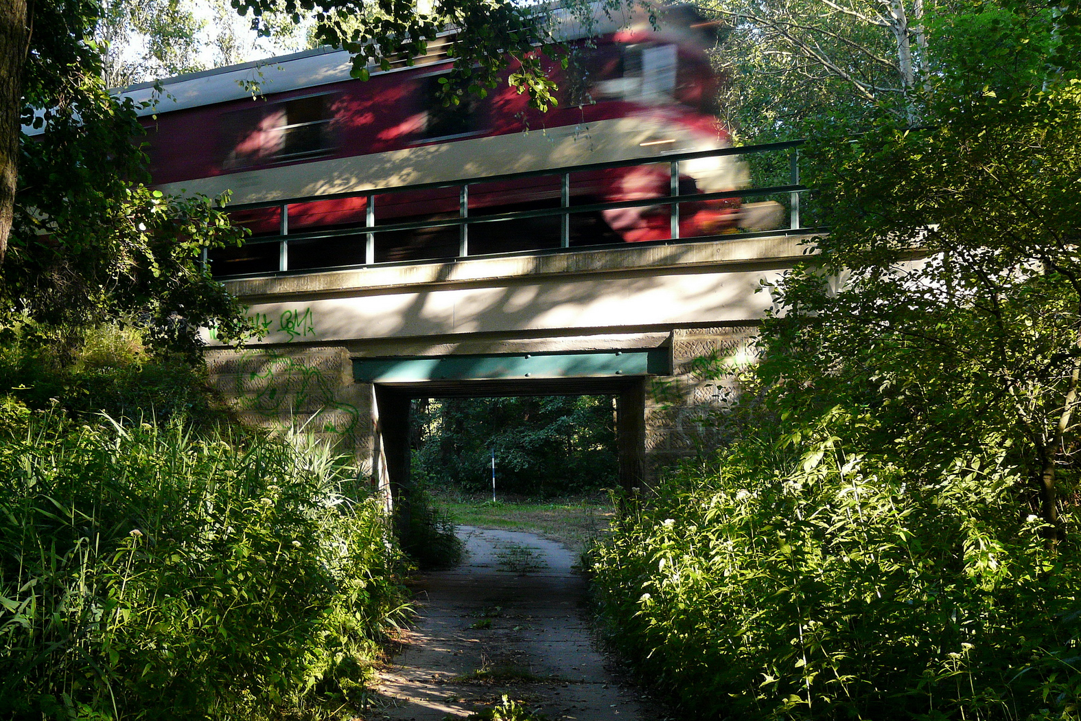 Podjezd bývalé Rečkovské lesní dráhy pod řádnou tratí 080 (Bakov nad Jizerou – Jedlová) – směr k pile.